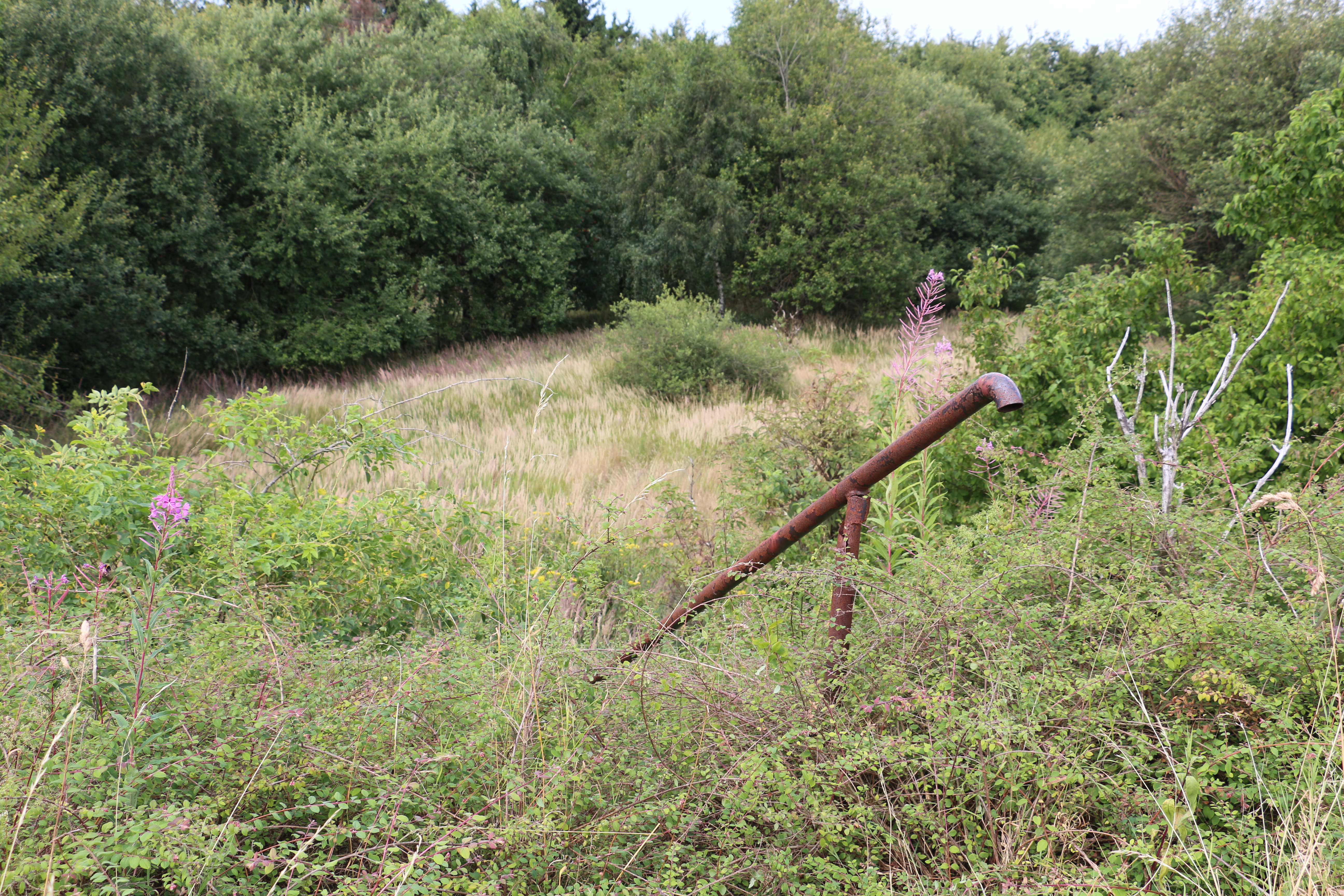 Blick auf einen Teil des ehemaligen Militärgeländes im NSG Schwalenberger Wald; Bereich südöstlich vom Mörth.